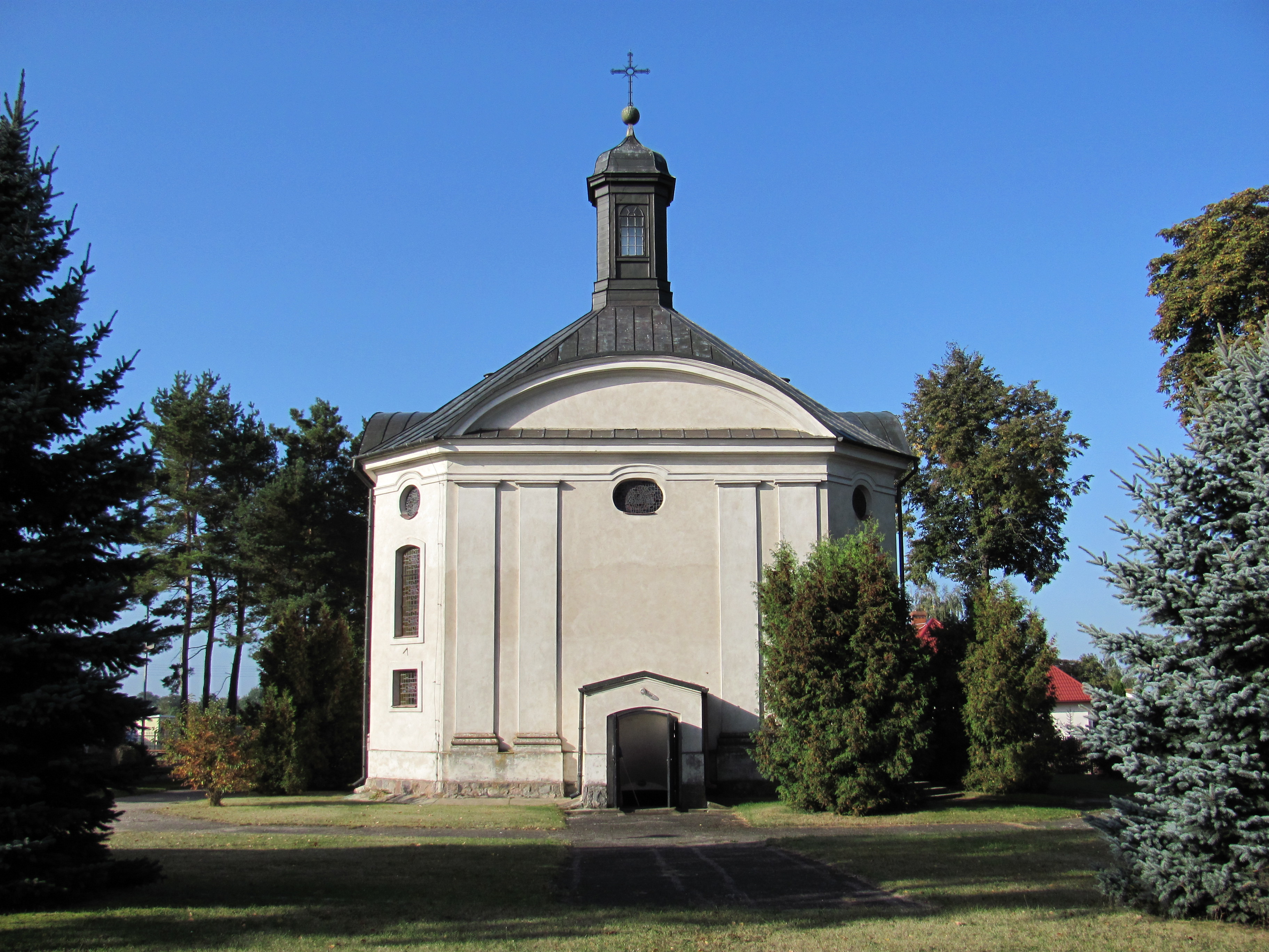 Klukowo - kościół p.w. św. Józefa, mur., 1810 (zabytek nr 39/331 z 05.02.1971)